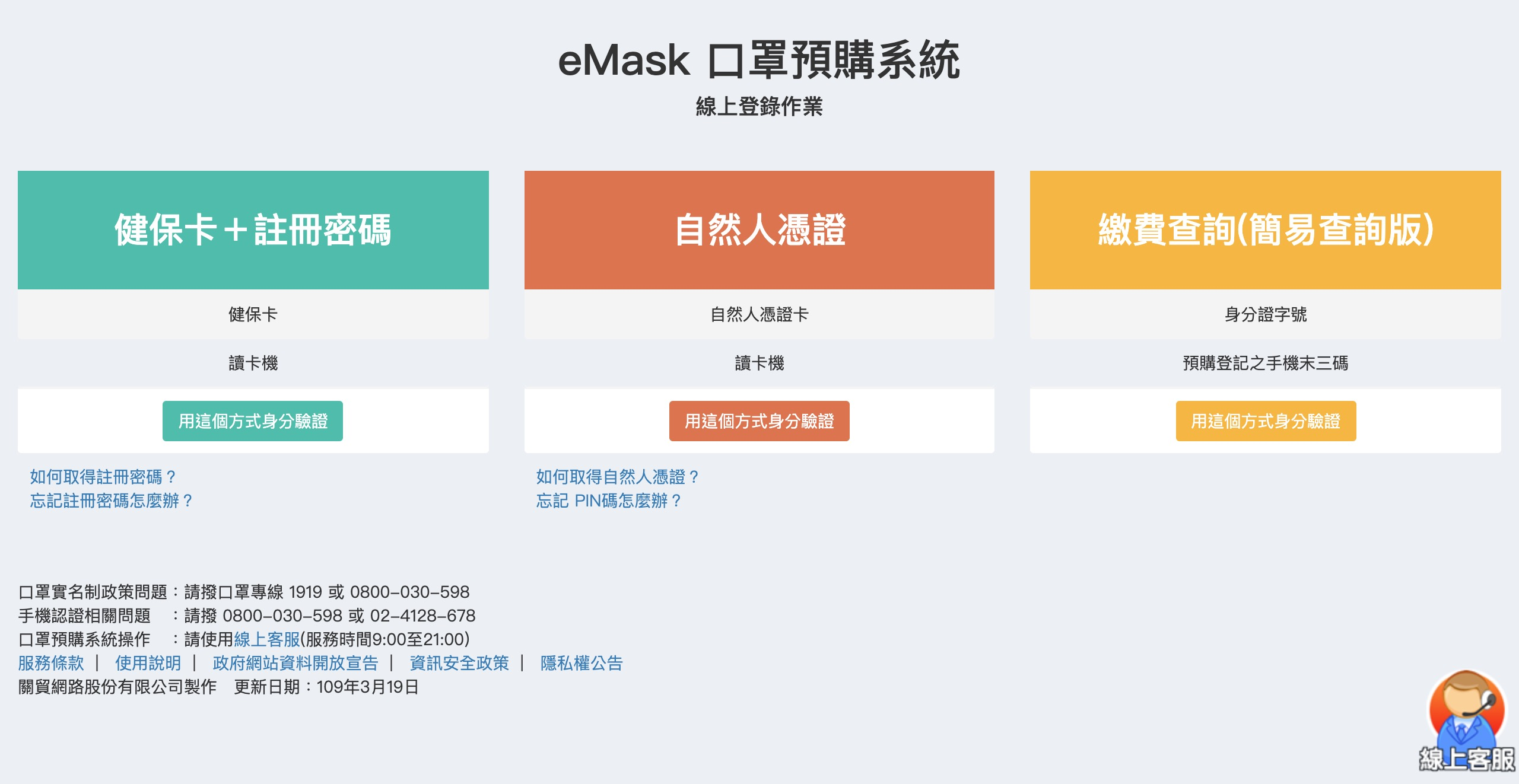 台灣口罩實名制2.0 eMask口罩預購系統入口畫面，電腦截圖